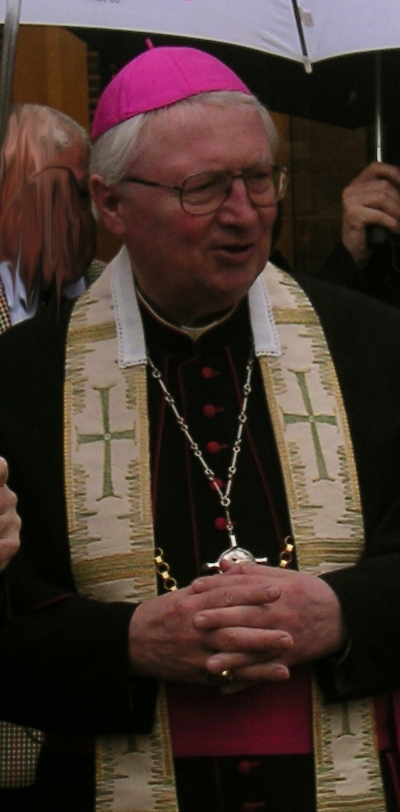 Franz Vorrath weiht als Diöszesanadministrator die Erweiterung der Essener Domschatzkammer